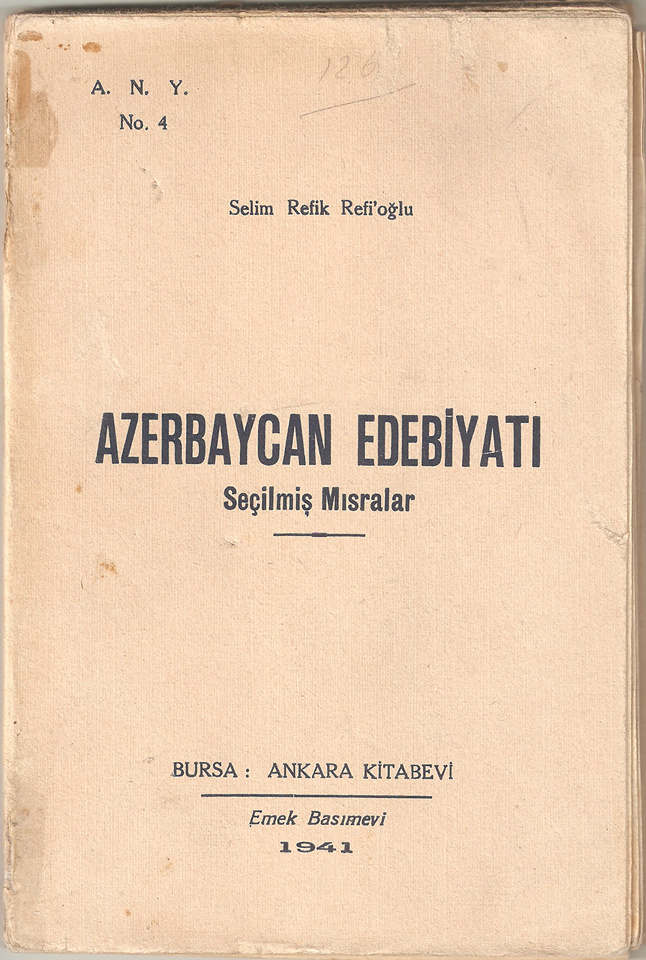 Səlim Rəfiq Rəfioğlunun kitabı